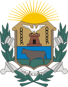 Escut de l'estat d'Anzoategui (VENEÇUELA)